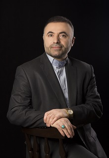 عطاءاله حکیمی